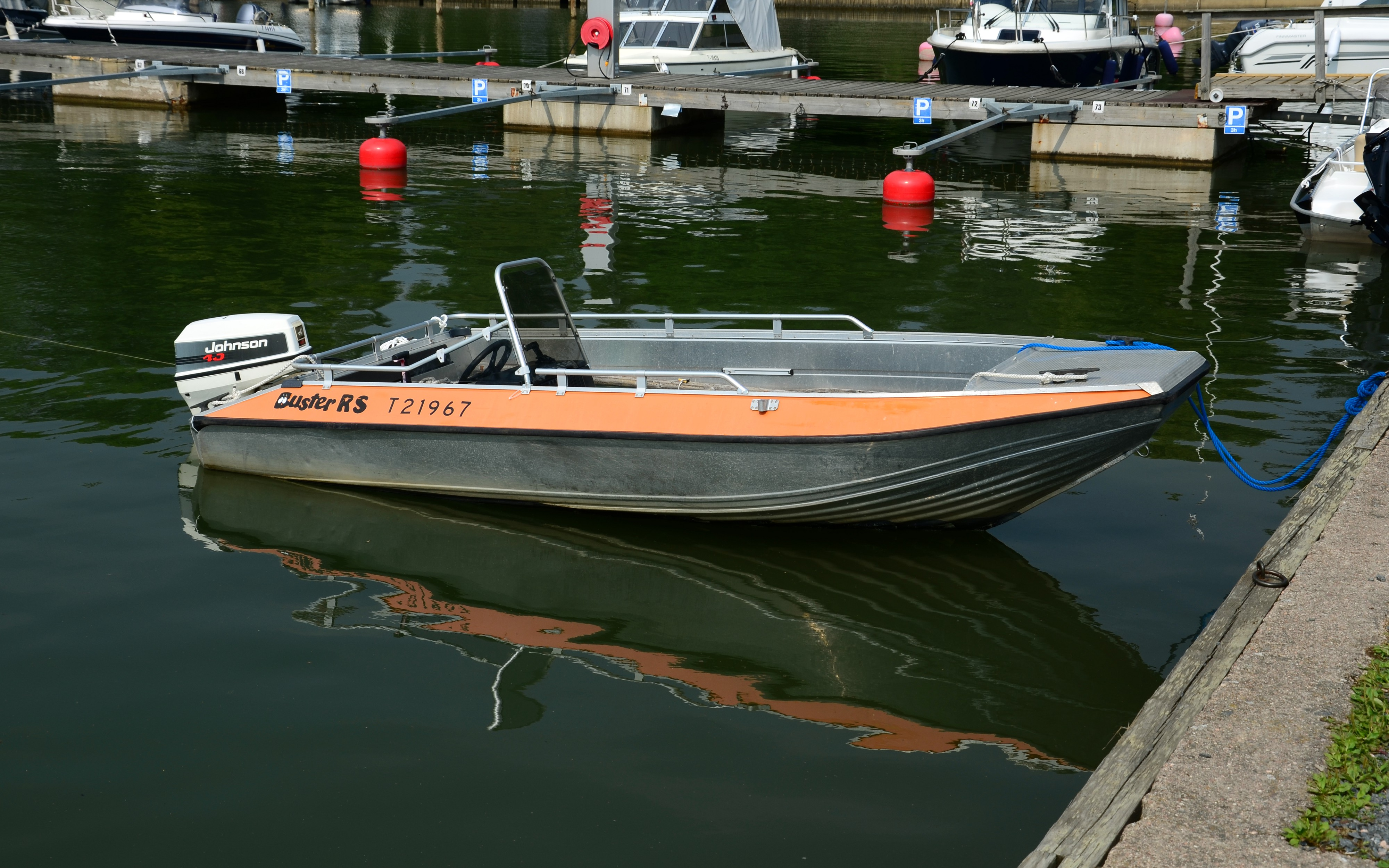 En Buster RS i Dalsbruk, Finland.